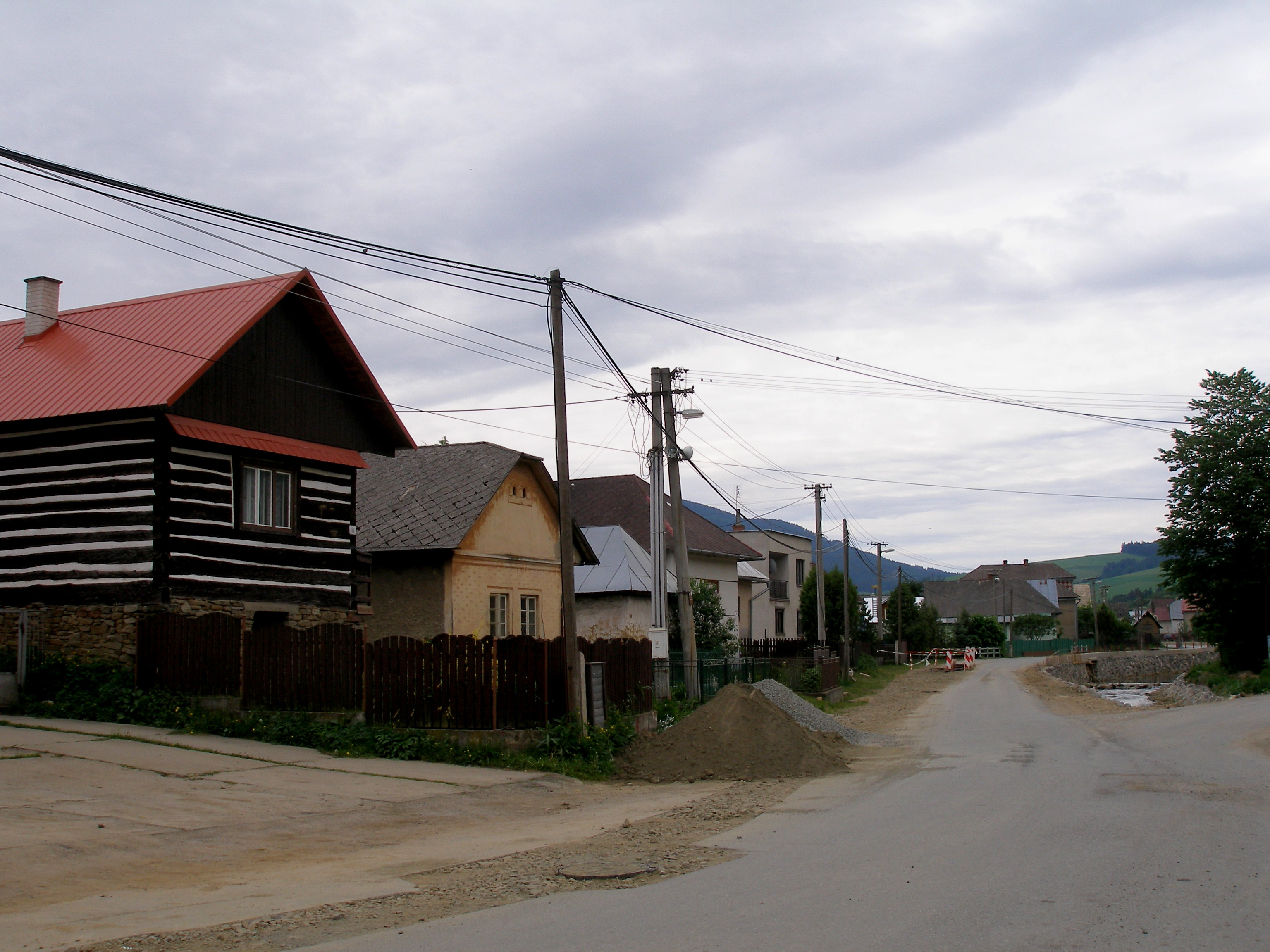 Obec Nižný Slavkov okres Sabinov.